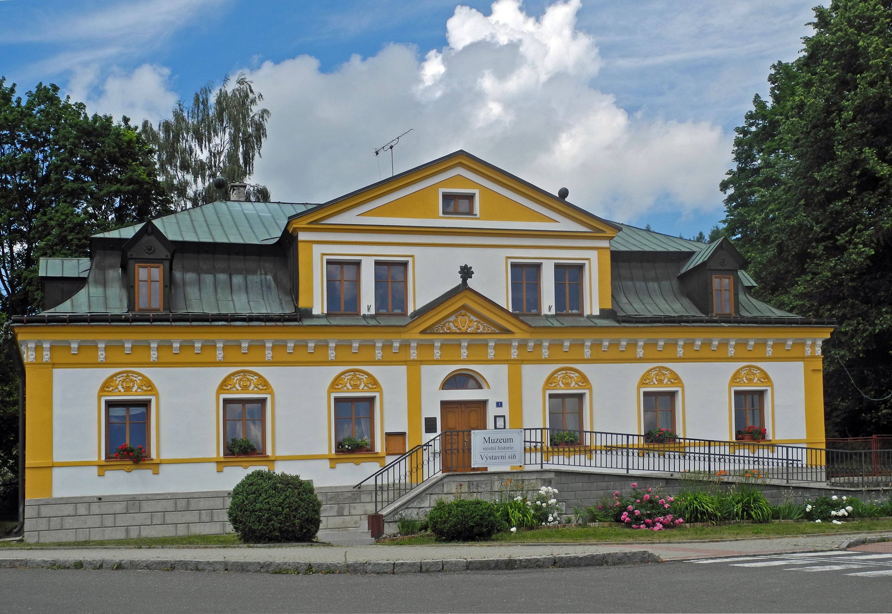 Herrenhaus in Smržovka (Morchenstern), nám. T. G. Masaryka 1